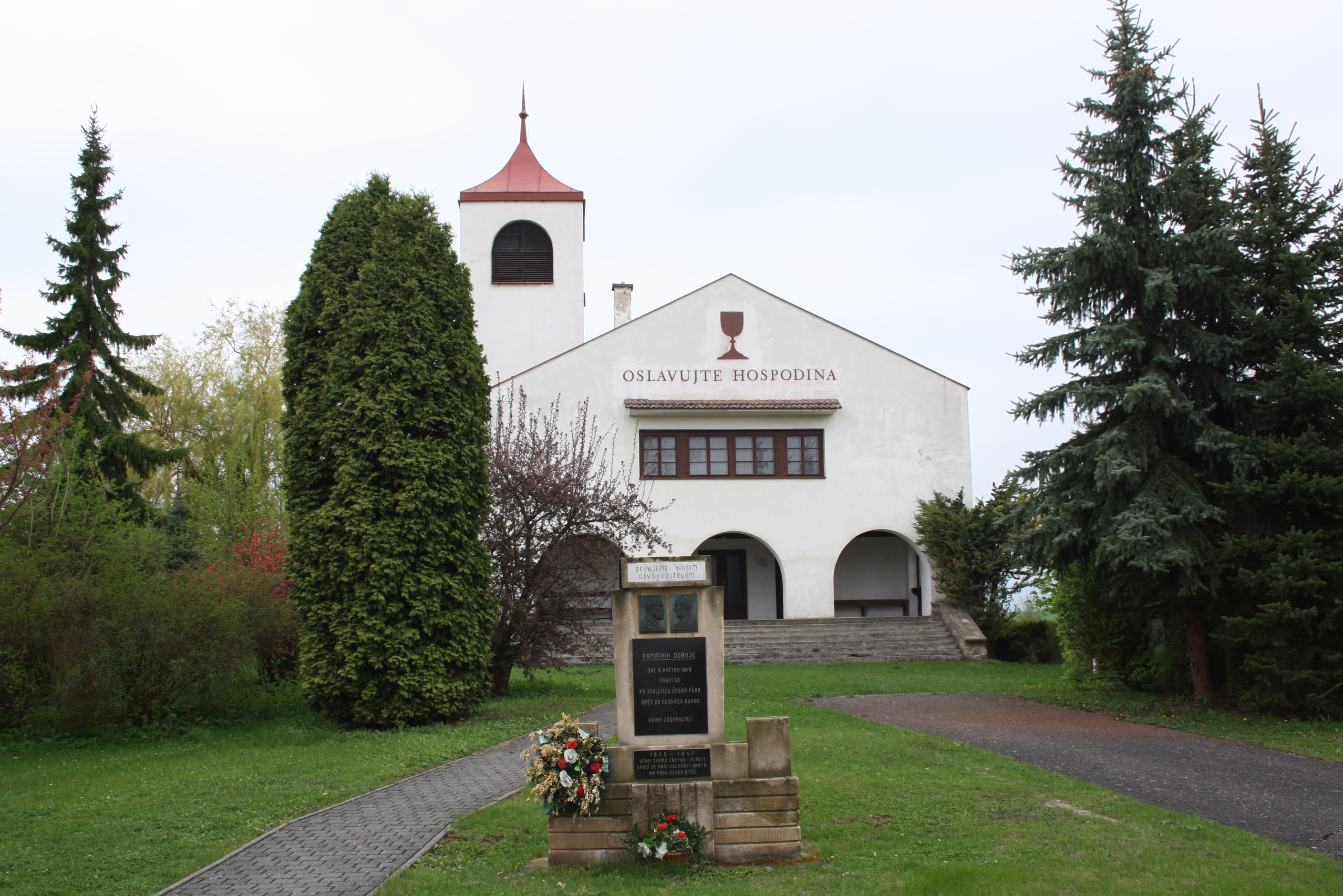 Kostel Českobrarské církve evangelické v Chotiněvsi (pohled od východu).